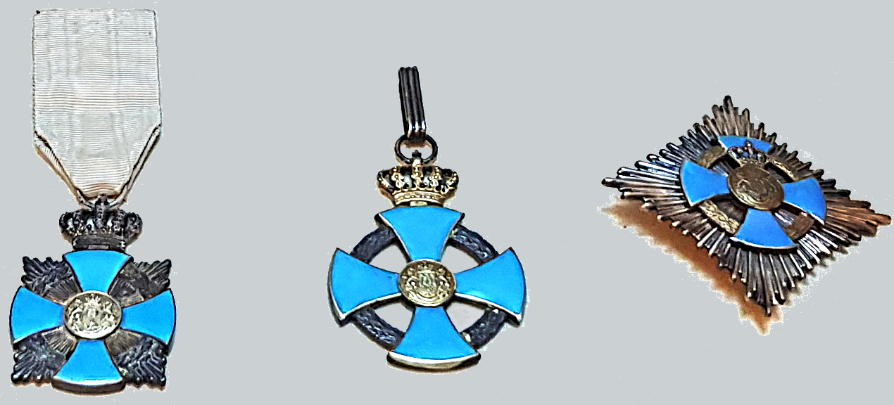 Drei Klassen des rumänischen Treudienst-Ordens (Ordinul Național „Serviciul Credincios”) in der Ausführung 1932.